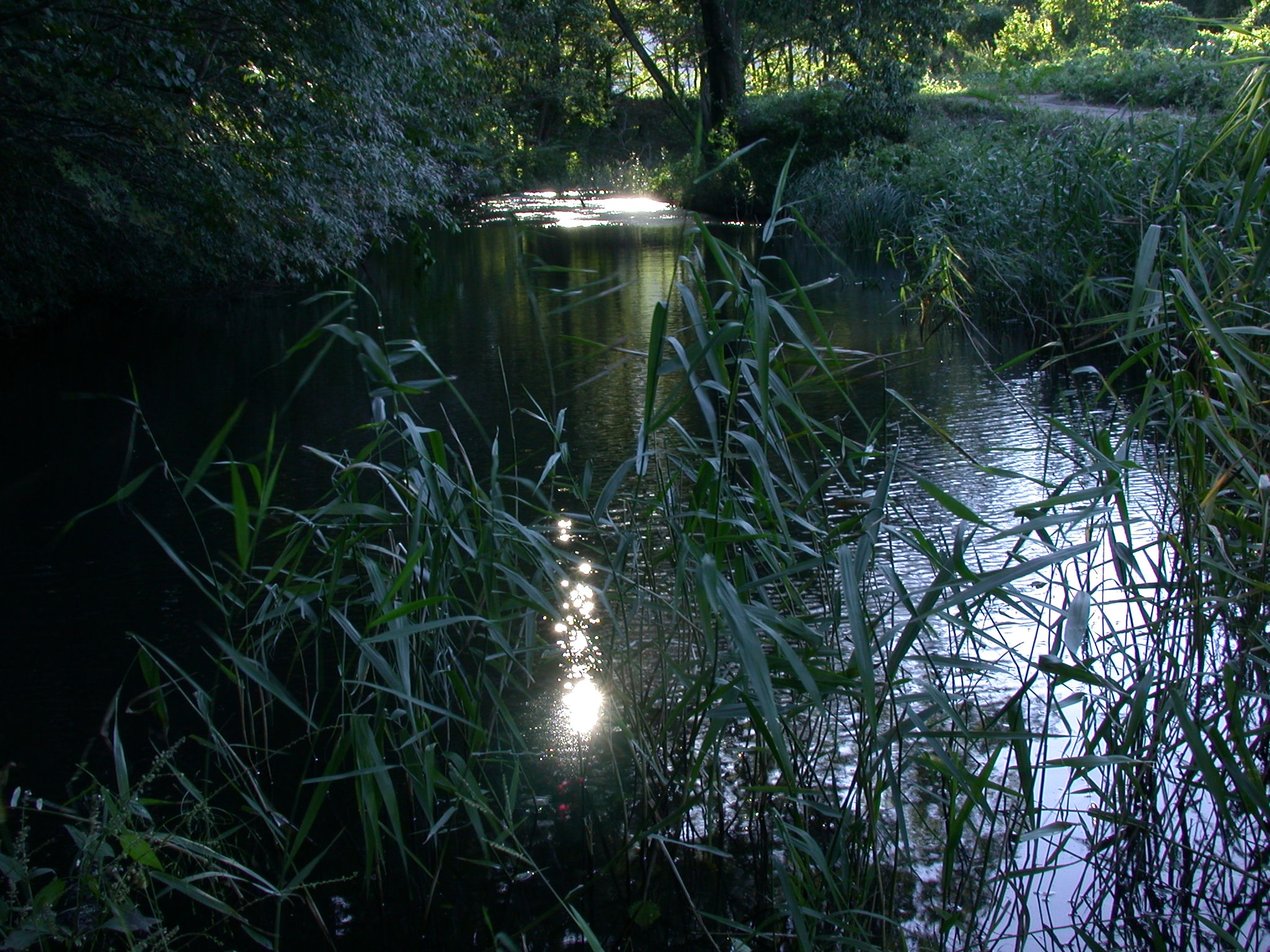 Shinpu Castle Umadashi Hori